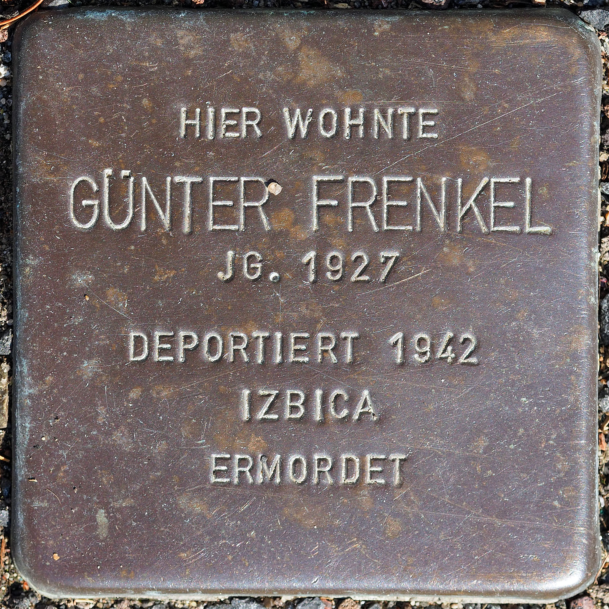 Stolpersteine MG: Frenkel, Günter